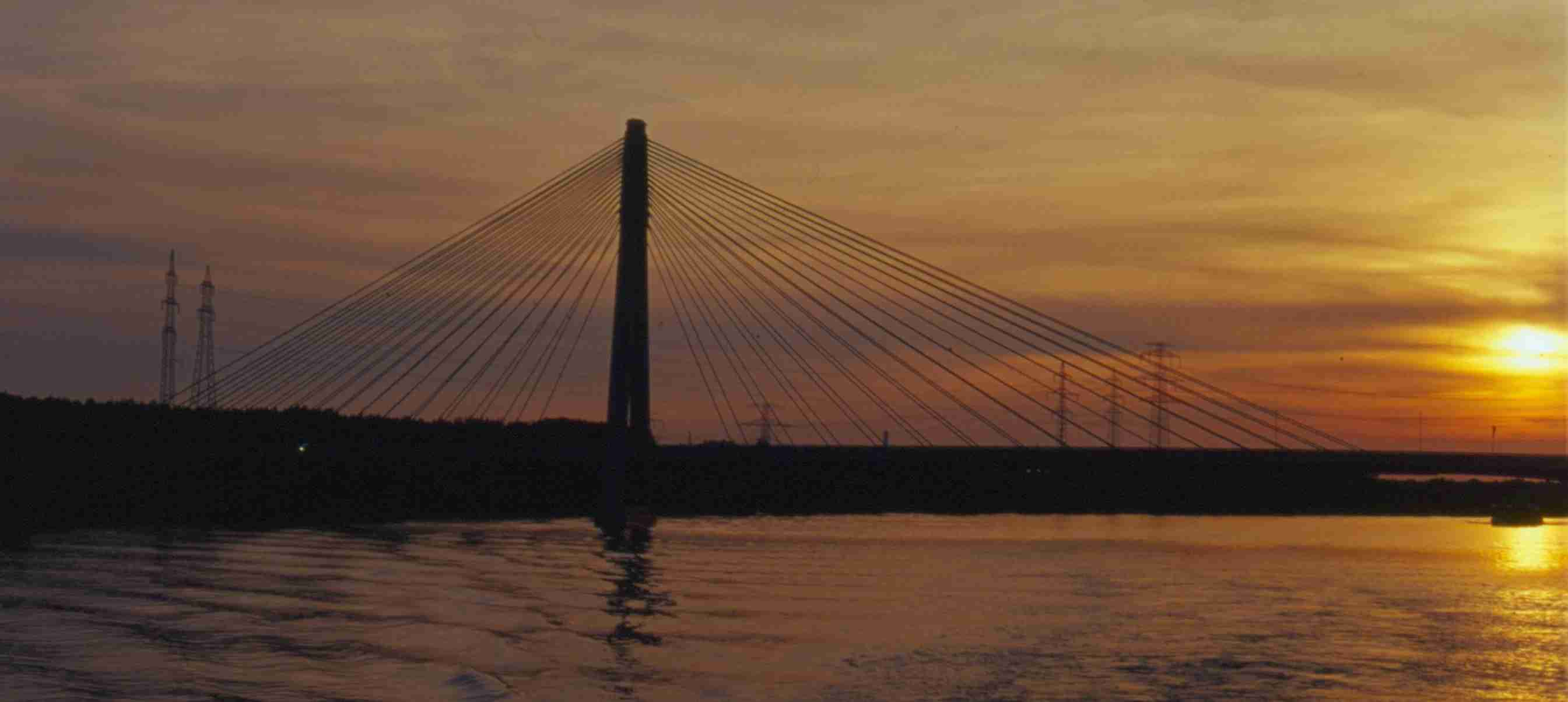 Rosenbrücke bei Tulln - Brücke über die Donau bei Stromkilometer 1965